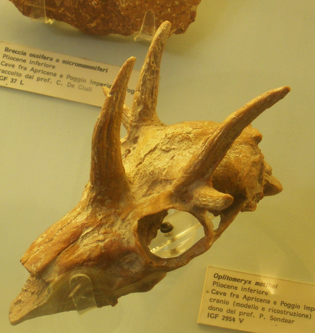 Fossil of Hoplitomeryx, an extinct mammal- Took the picture at Museo di Paleontologia di Firenze